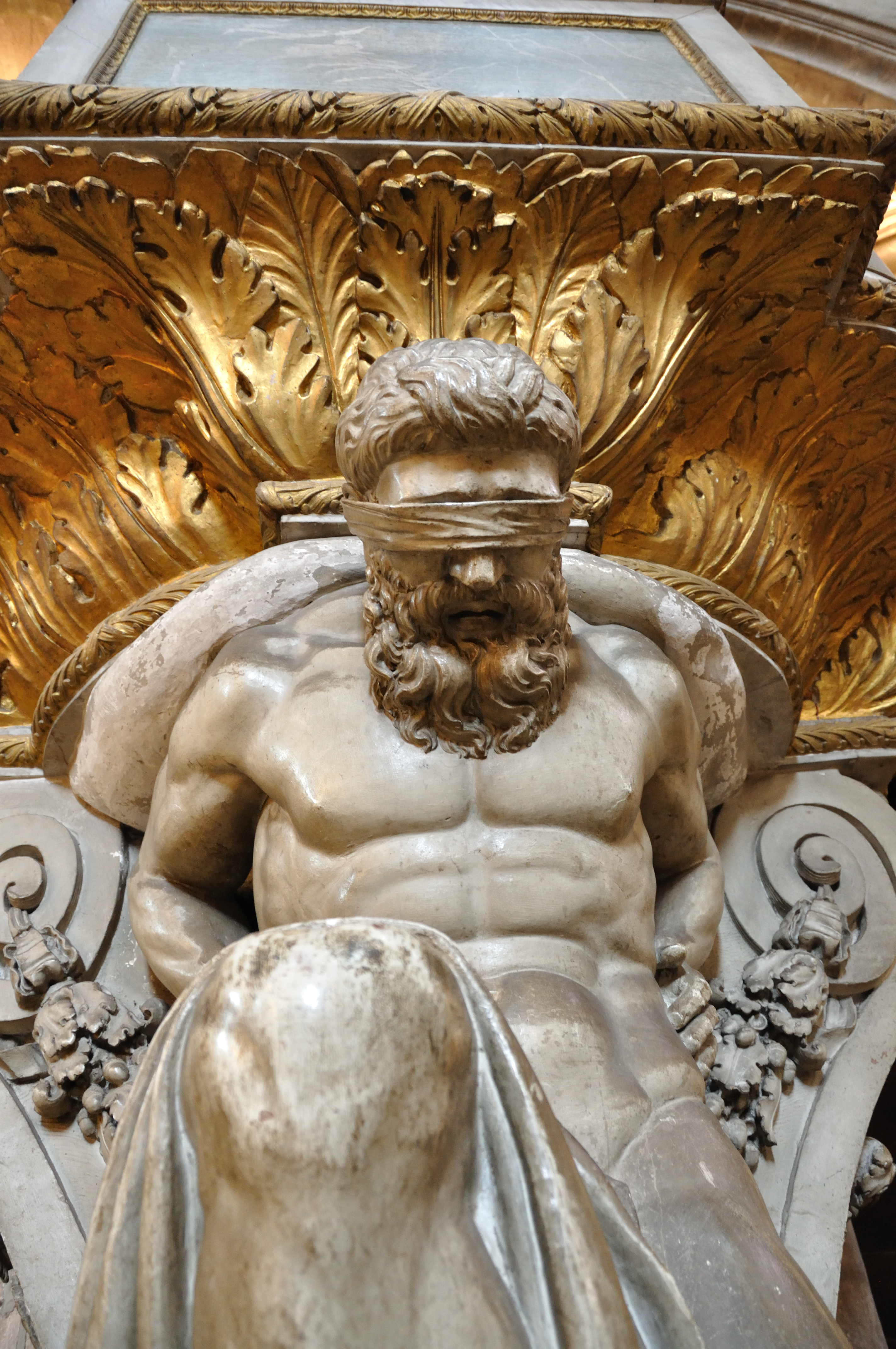 Détail de la chaire de la cathédrale de Rodez.